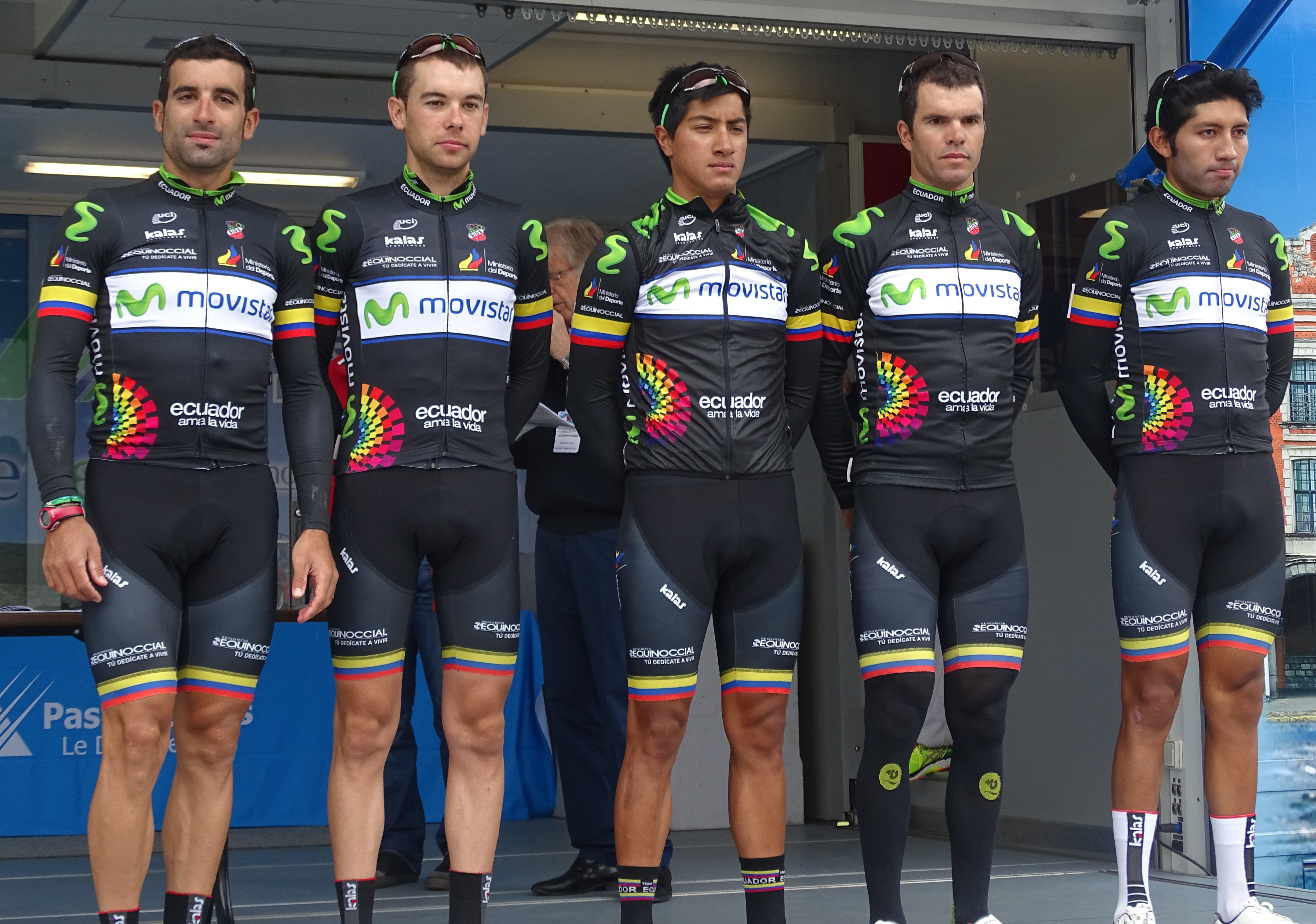 Reportage réalisé le samedi 23 mai 2015 à l'occasion du départ de la deuxième étape du Paris-Arras Tour 2015 à Ficheux, Pas-de-Calais, Nord-Pas-de-Calais, France. Depicted people: Daniel Domínguez, Higinio Fernández, Jorge Luis Montenegro, Jaume Rovira and Carlos Quishpe Depicted team: Ecuador